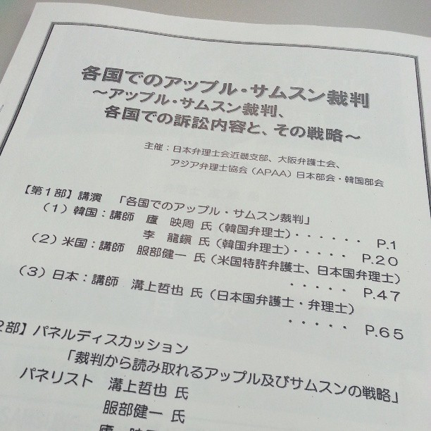 大阪出張、知財系所用のひとつだん。知財系講演会を堪能した。講演された方々、企画・運営された方々、お疲れさまです。ありがとうございます。